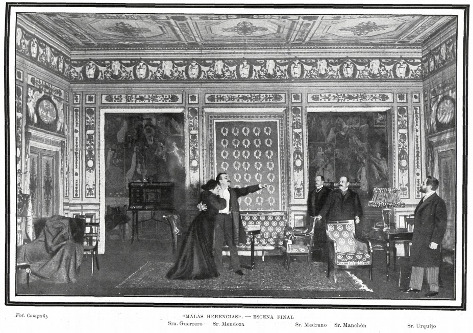 Escena final de «Malas herencias» (obra de Echegaray); fotografía de Compañy